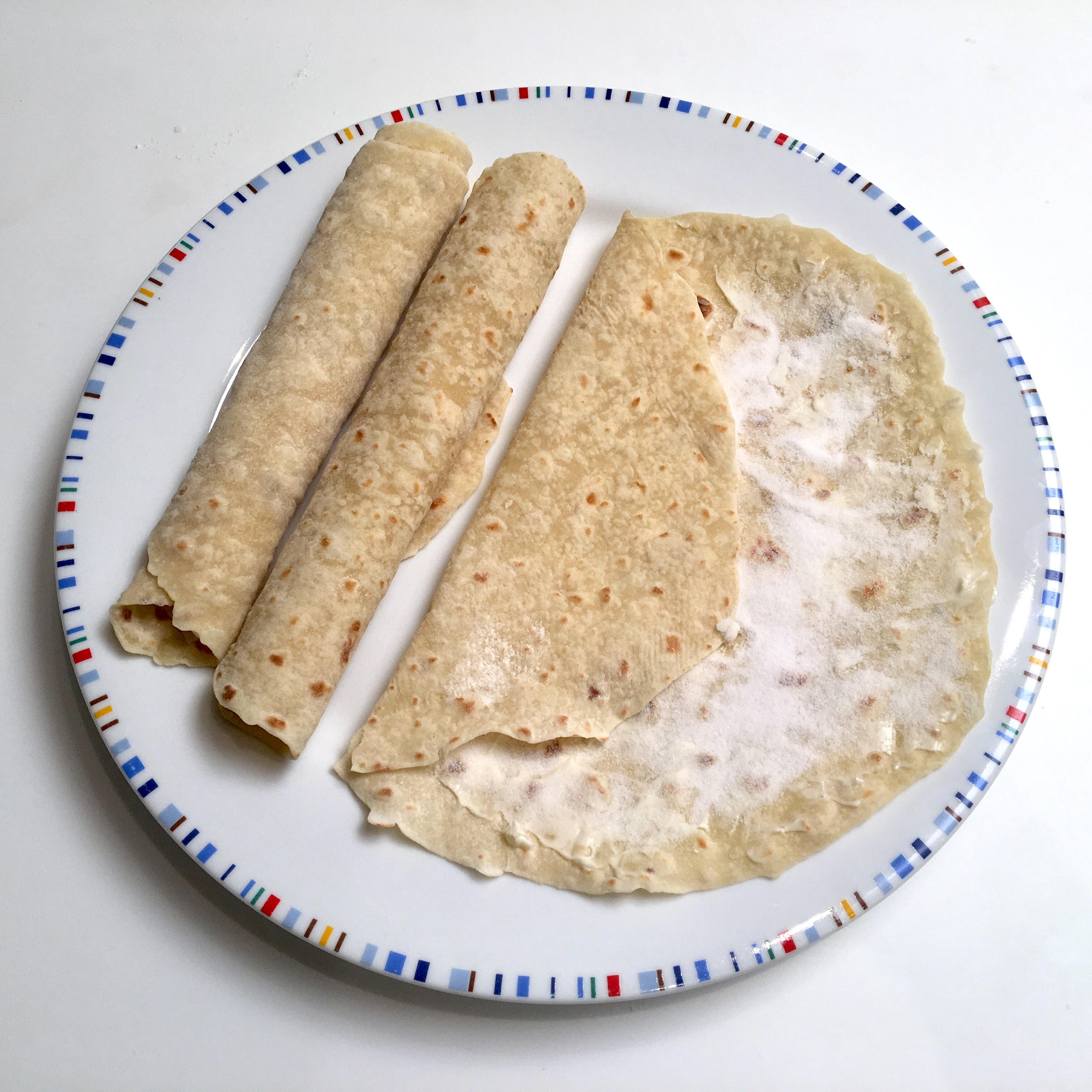 Dessert Lefse, Butter and Sugar